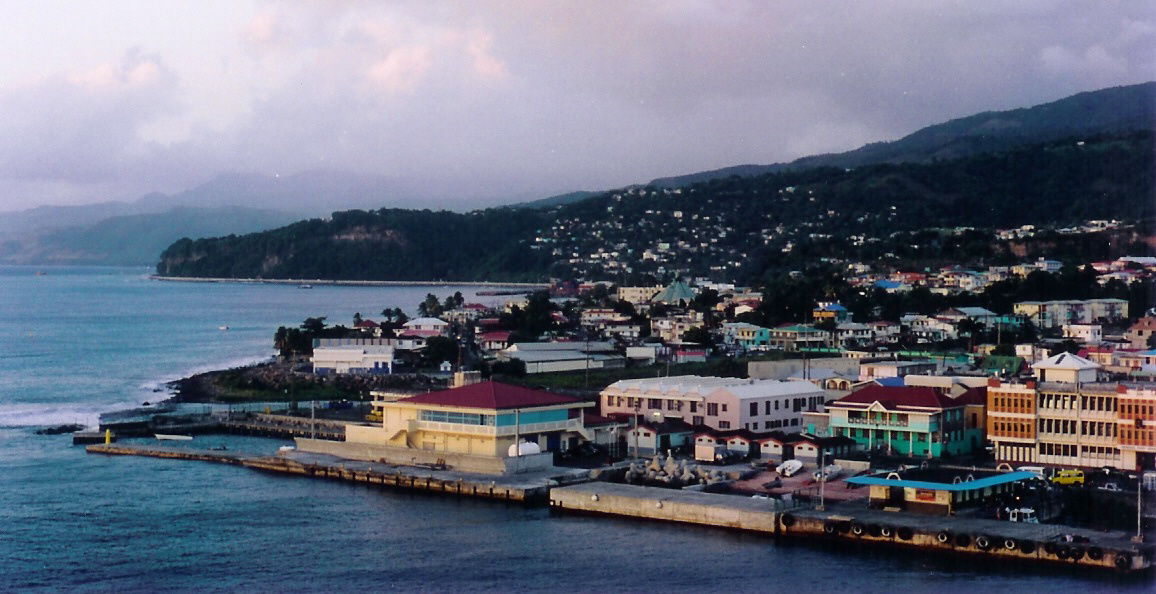 Roseau, ibu negara Dominica.